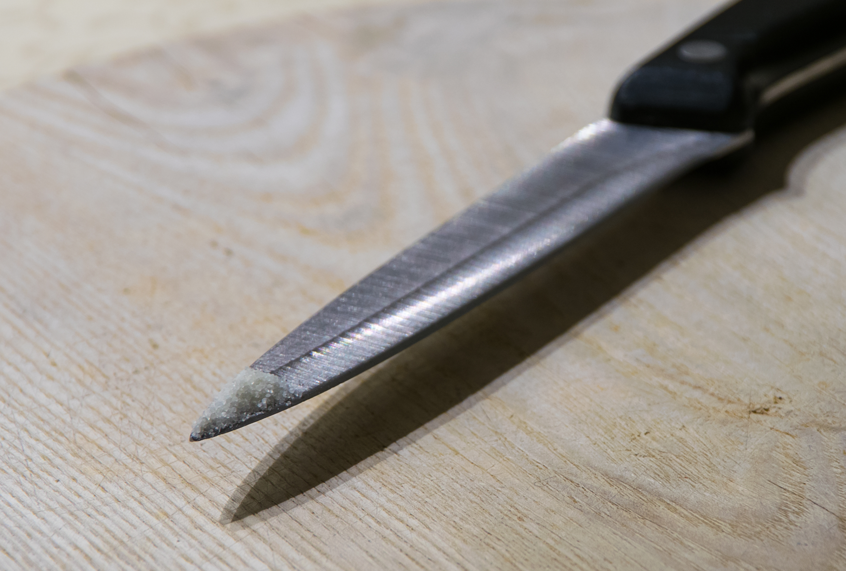 eine Messerspitze (Küchenmaß)